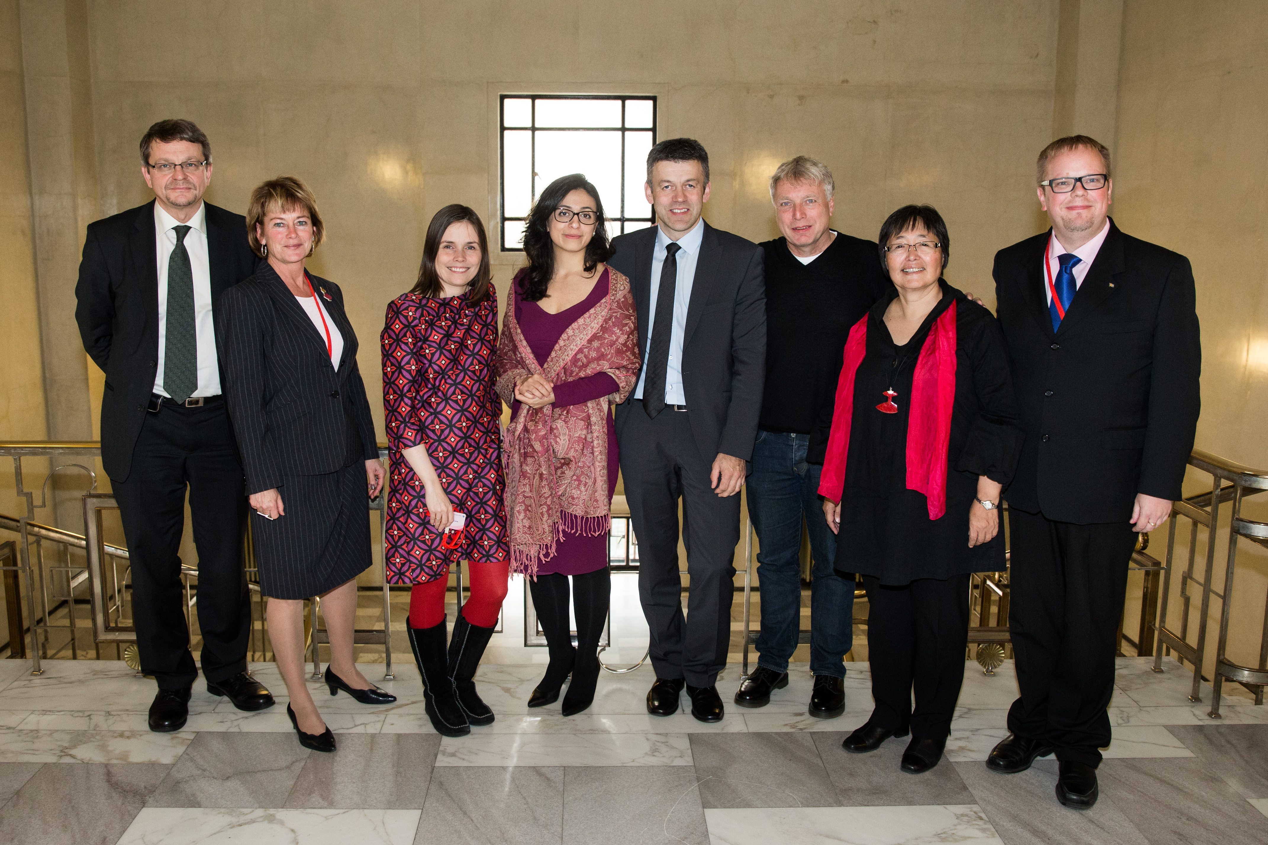 Nordiska råŒdets session i Helsingfors 2012.